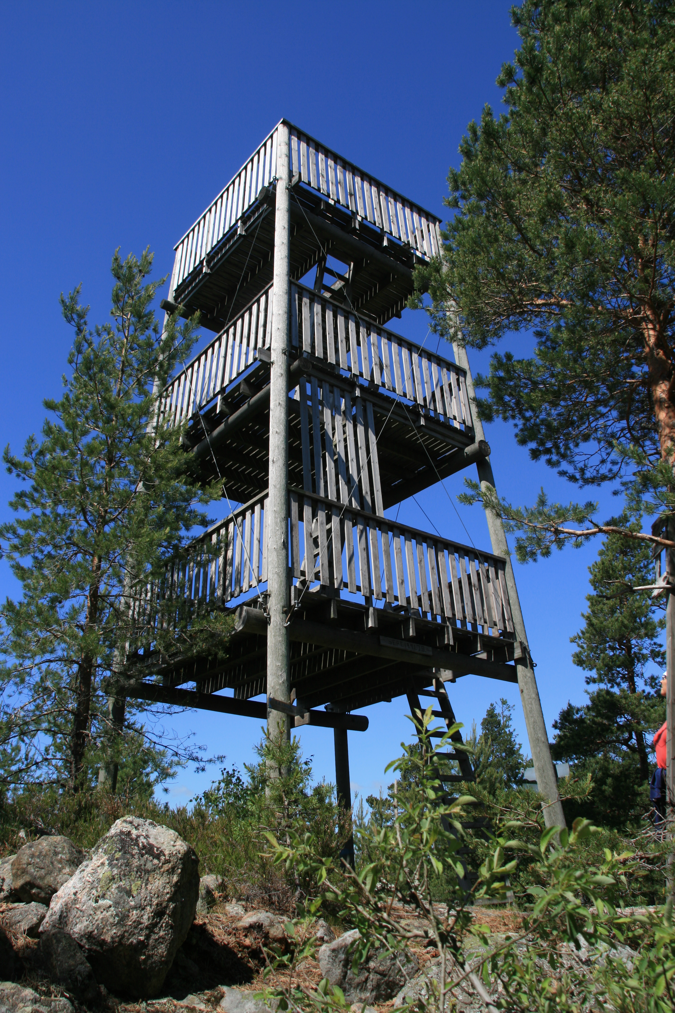 Nordre Stange varde har en høyde på 290 meter over havet og er det 15. høyeste punktet i Østfold av åsene med primærfaktor på minst 50 meter.